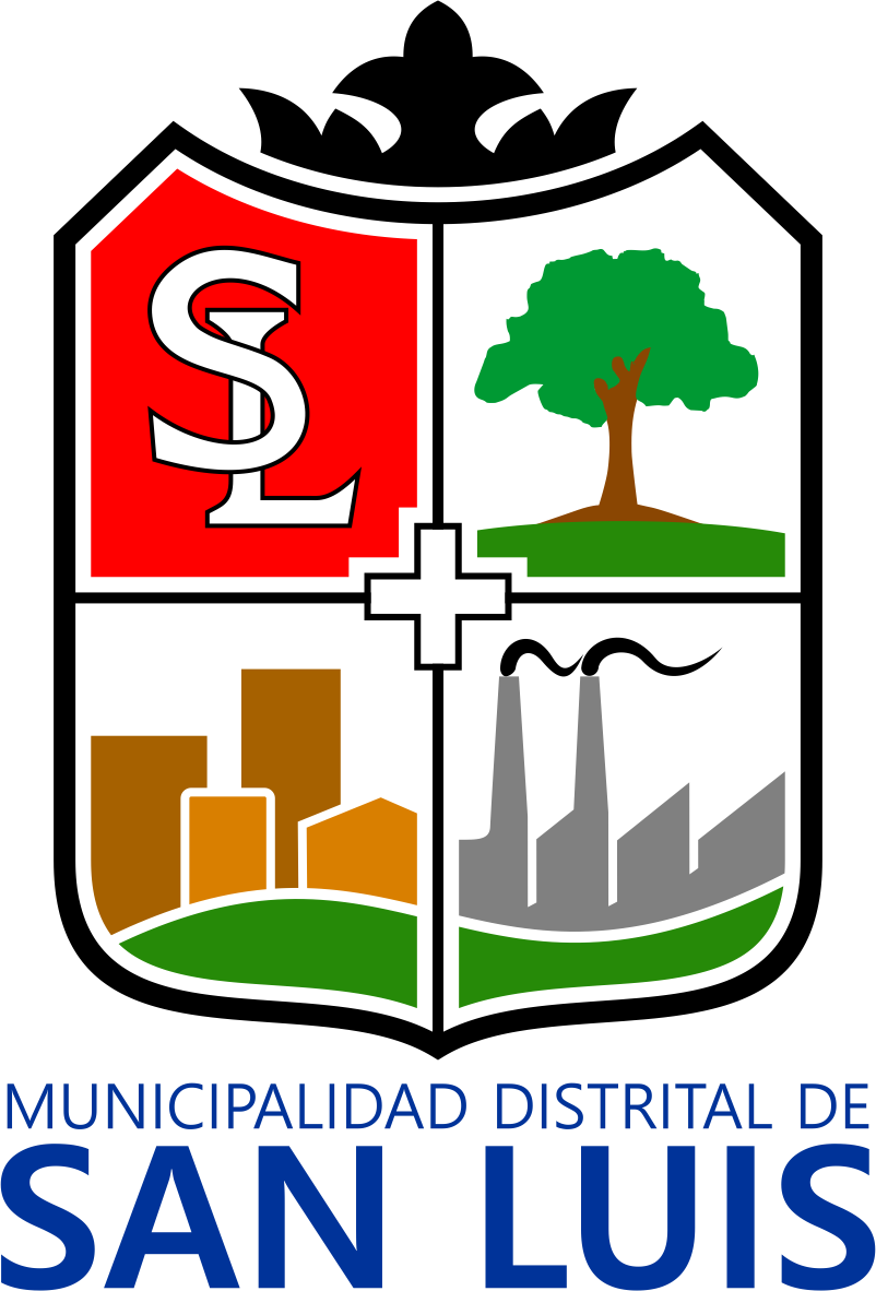 Escudo del distrito de San Luis - Provincia de Lima - Región Lima